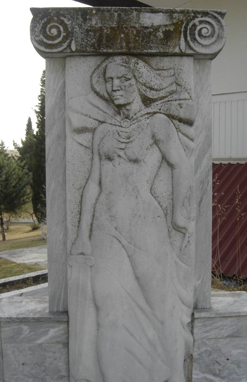 A memorial plaque at Kato Agiannis, Pieria.